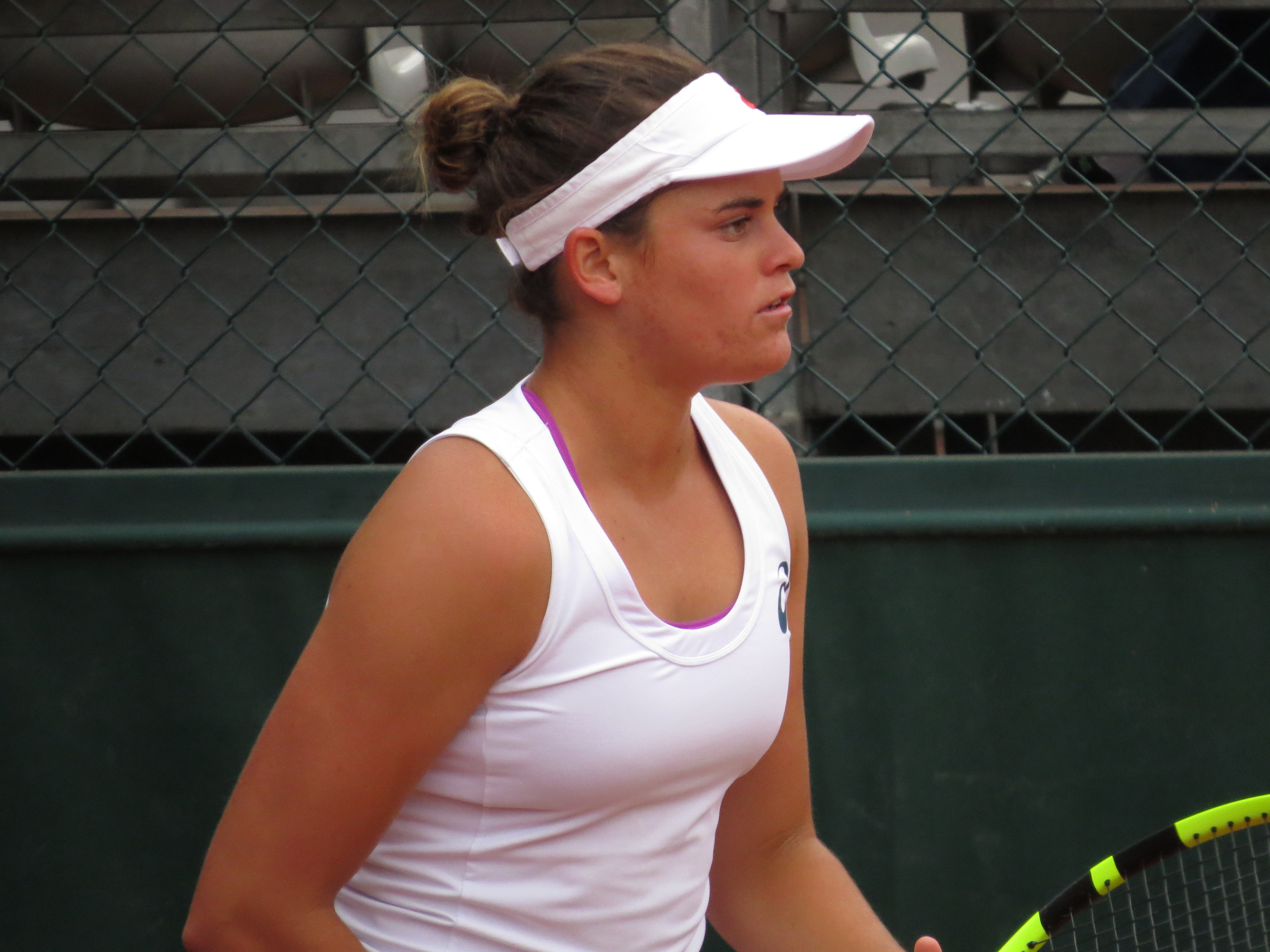 3eme tour des qualifications : Daniela Hantuchová vs Jennifer Brady